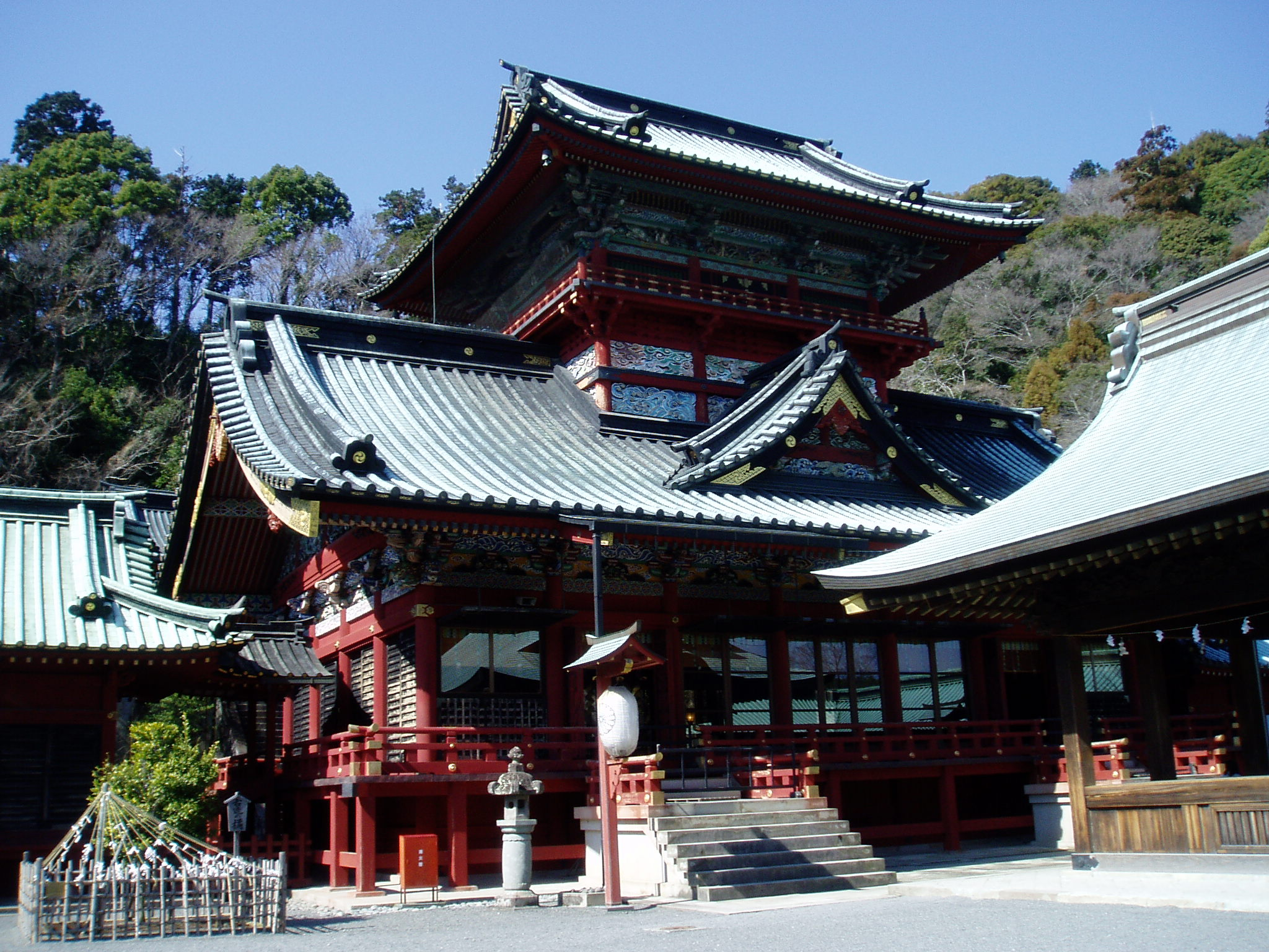 Ōhaiden (大拝殿) of Shizuoka Sengen Shrine (静岡浅間神社) in Shizuoka, Japan.